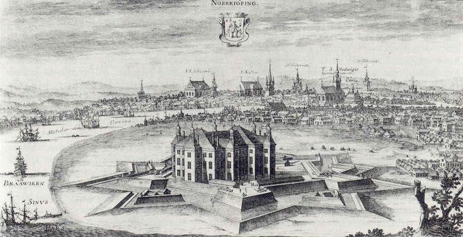 Norrköping, ur Suecia Antiqua et hodierna (band 3 plansch 6) Östergötlands största stad var Norrköping. Erik Dahlberg har i sitt praktverk Suecia Antiqua et hodierna porträtterat staden, såsom den såg ut före ryssarnas angrepp 1719, med slottet Johannisborg och fem segelfartyg seglande till och från Bråviken i förgrunden. Samma vatten som fyllde slottets vallgravar. Tre kyrkor syns i bakgrunden, alla inom stadens tullar och vid sidan av dessa rådhuset, Holmentornet och Wåhltornet. Det sistnämnda ett utsiktstorn för stadens säkerhet nattetid och till stadens försvar.